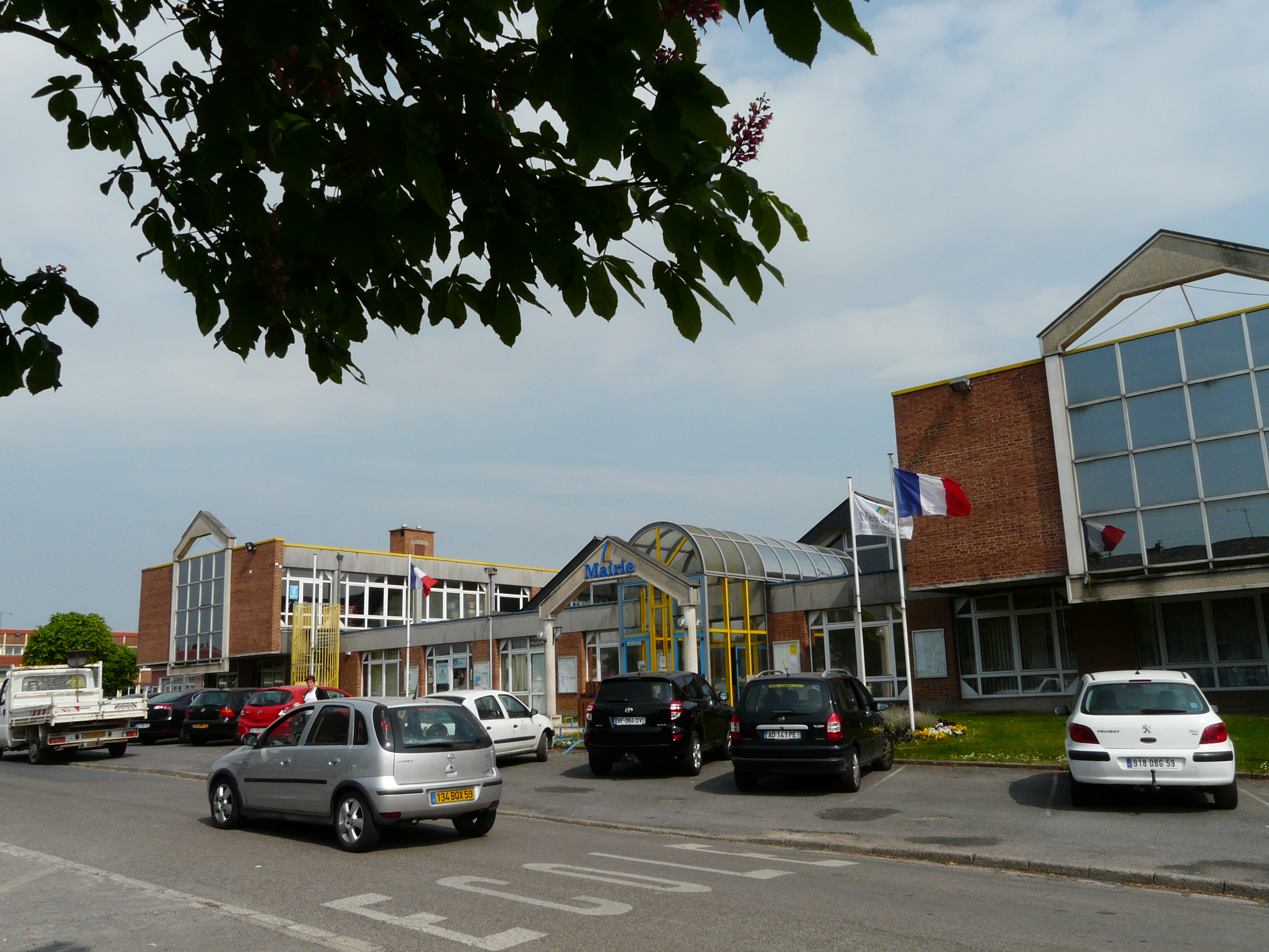 Mairie de Neuville-Saint-Rémy (Nord, France)